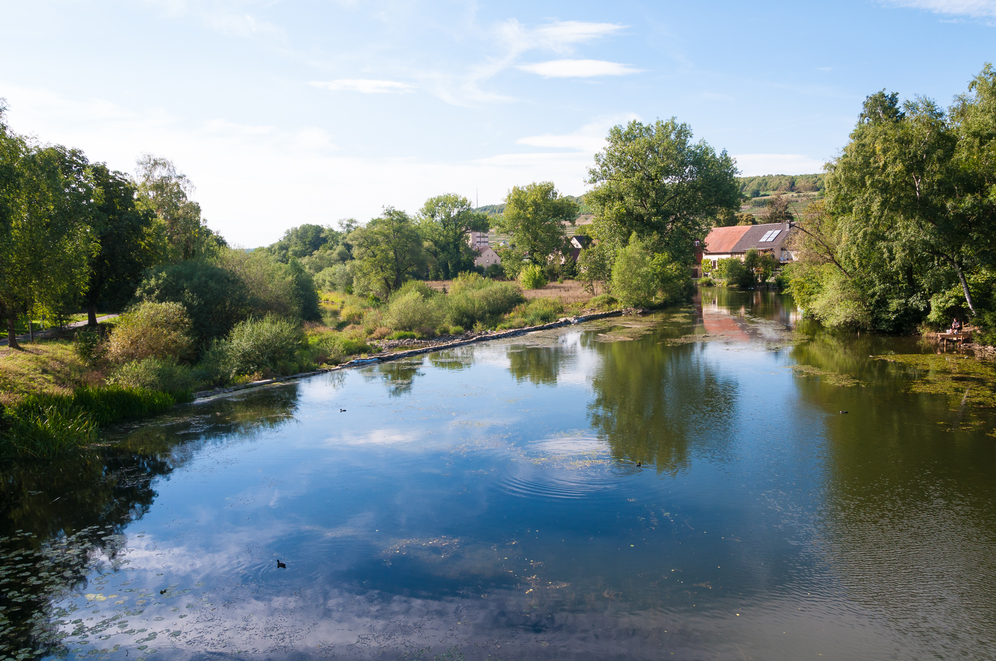 In Erwartung des mit Ammoniumnitrat kontaminierten Wassers wurde die Jagst in den Mühlkanal umgeleitet um den ökologisch wertvollen Flusslauf zu schützen (27. August 2015).